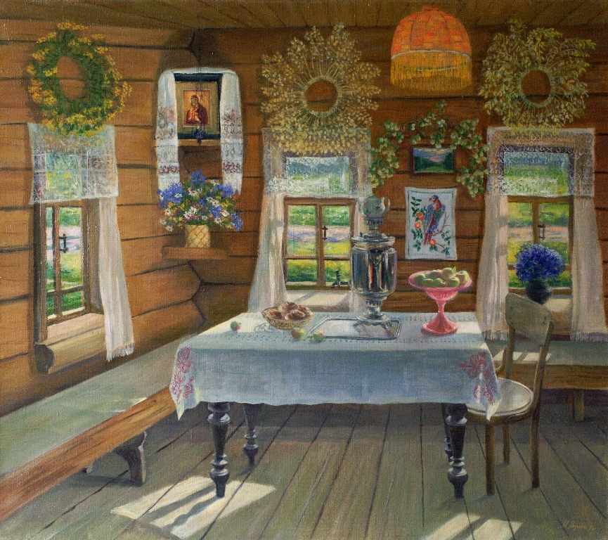 Интерьер "Яблочный Спас"